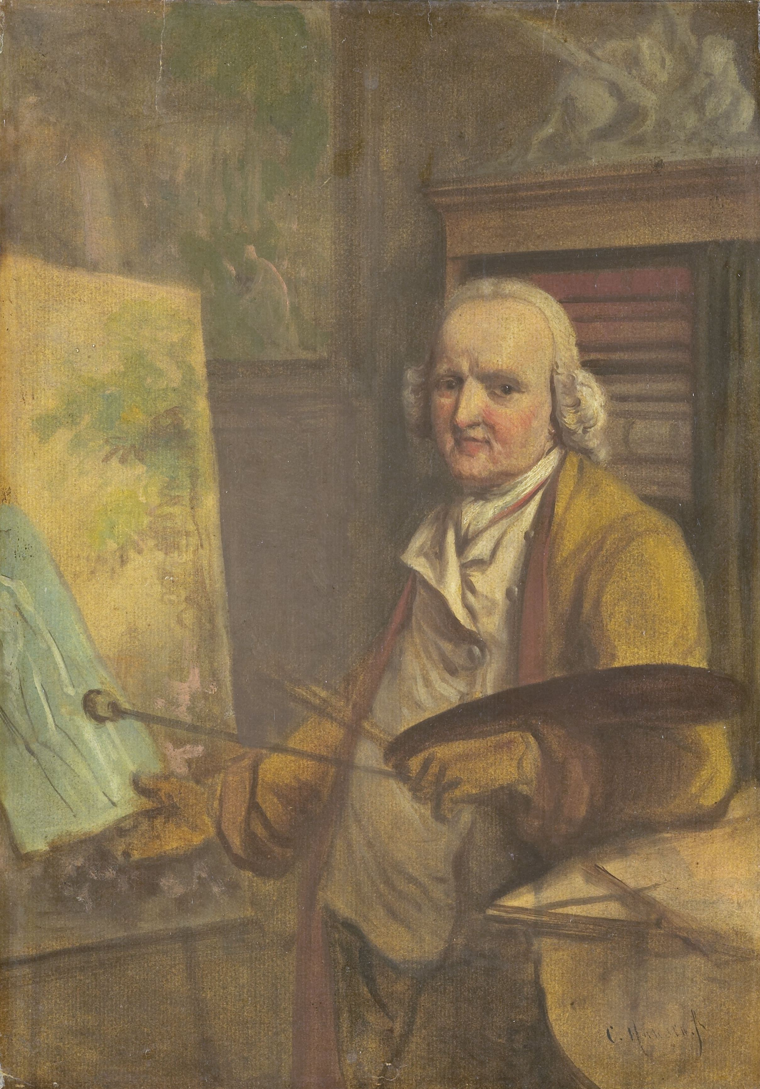 Zelfportret van de schilder Jurriaan Andriessen staande bij zijn ezel, palet in de hand.